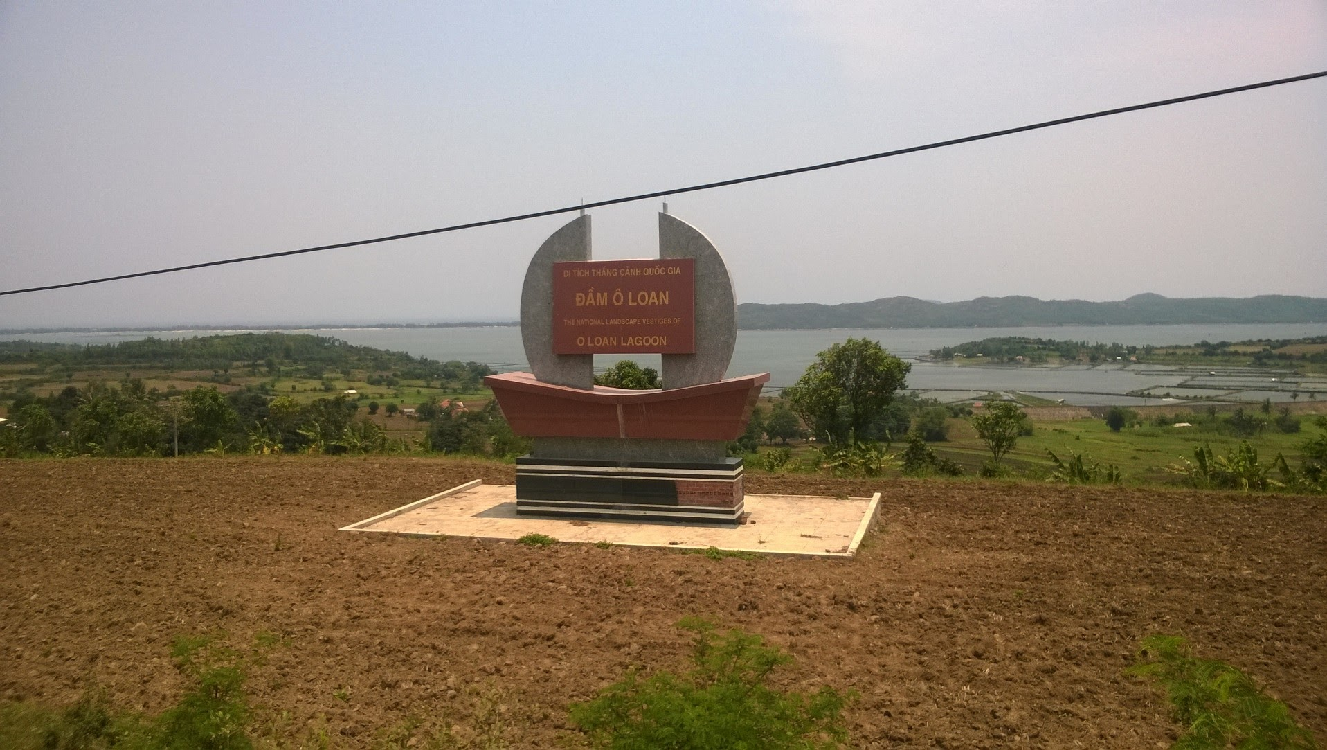 Đầm Ô Loan, An Hiệp, Tuy An, Phú Yên